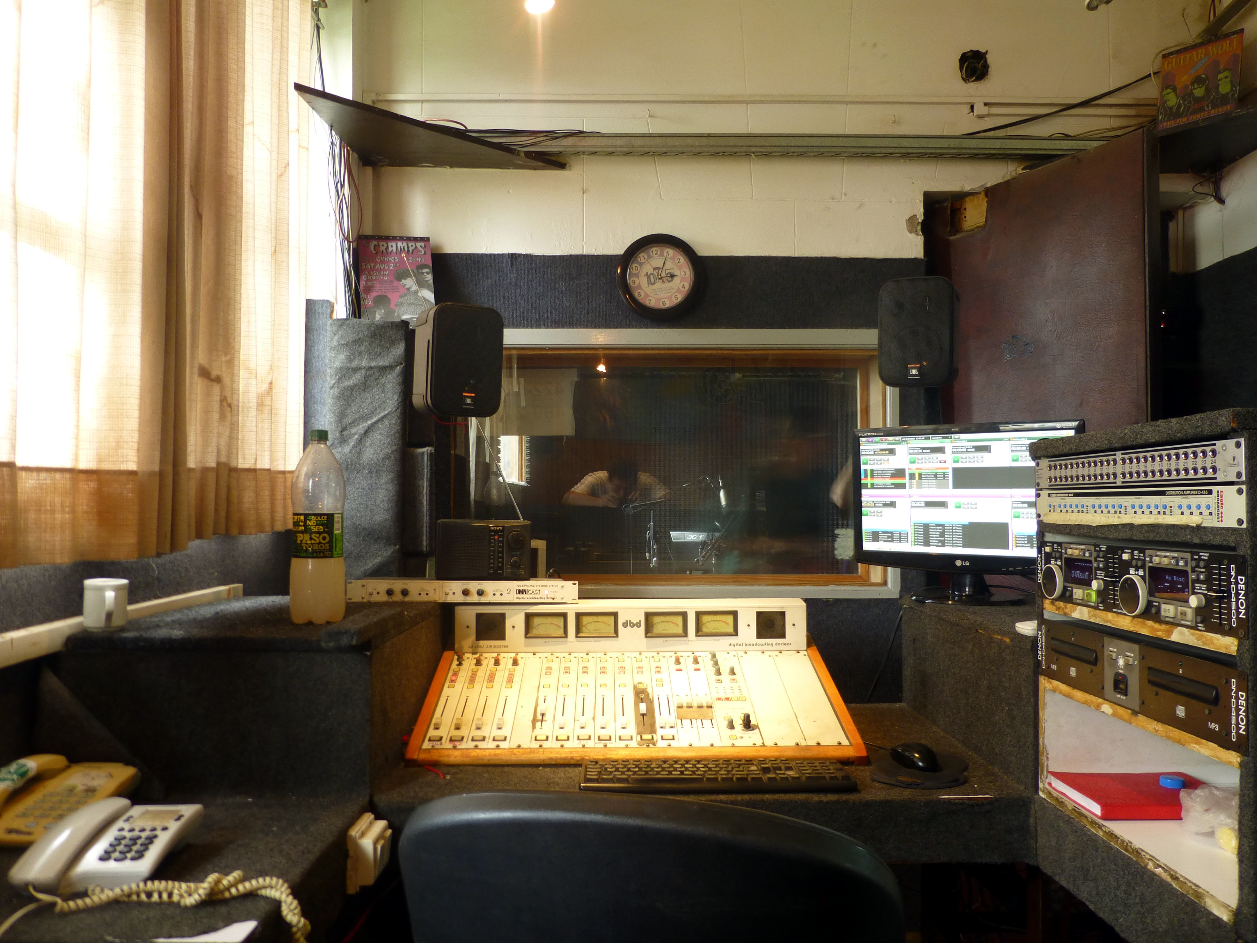 LR11 Radio Universidad Nacional de La Plata (Argentina)